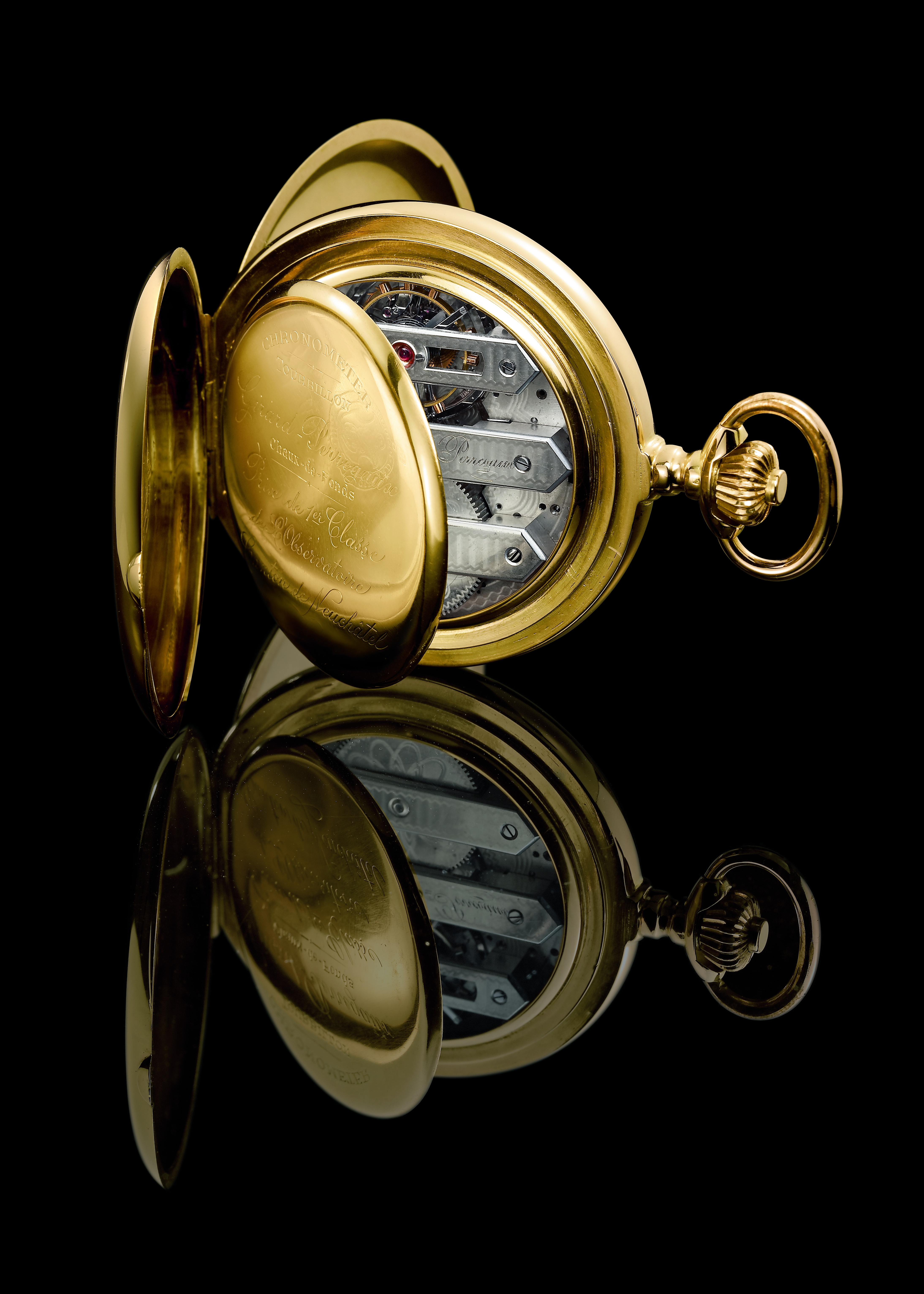 Chronomètre de poche en or rose signé "Girard-Perregaux", vers 1860. Boîtier gravé du monogramme "JJG". Cadran émail blanc. Mouvement à trois ponts parallèles nickelés, échappement à tourbillon. Cette montre a obtenu un prix de première classe à l'Observatoire de Neuchâtel.